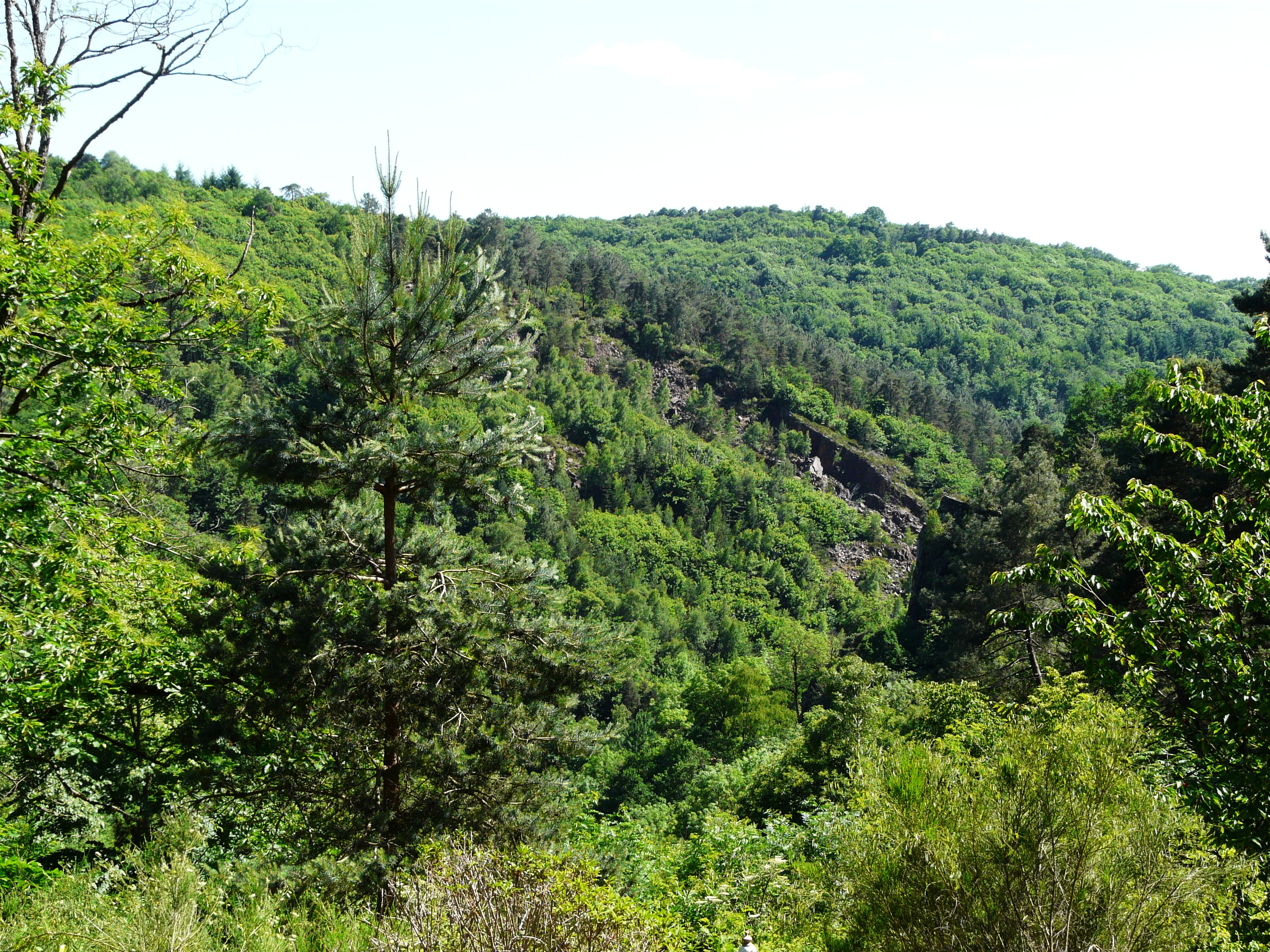 Les gorges du Coiroux au saut de la Bergère, entre Palazinges (à gauche) et Aubazine, Corrèze, France